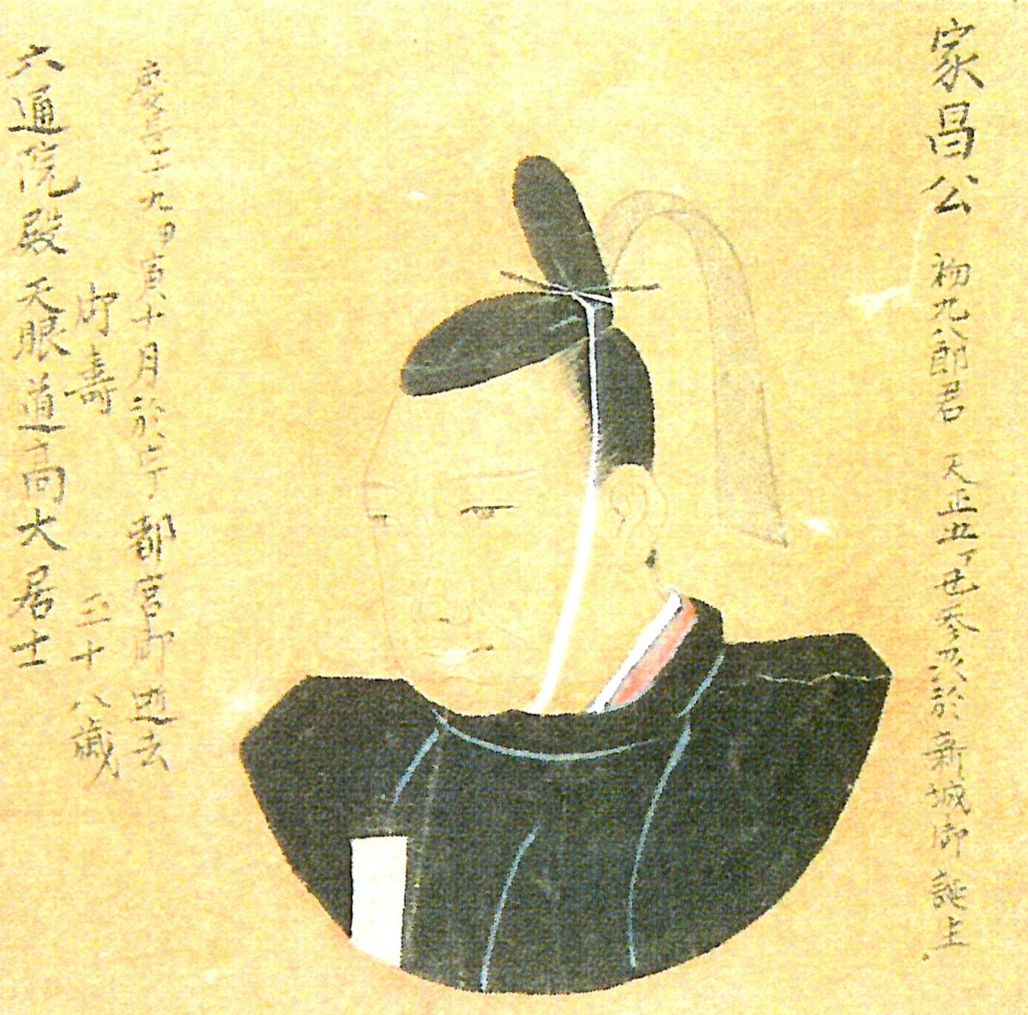 奥平家昌の肖像。